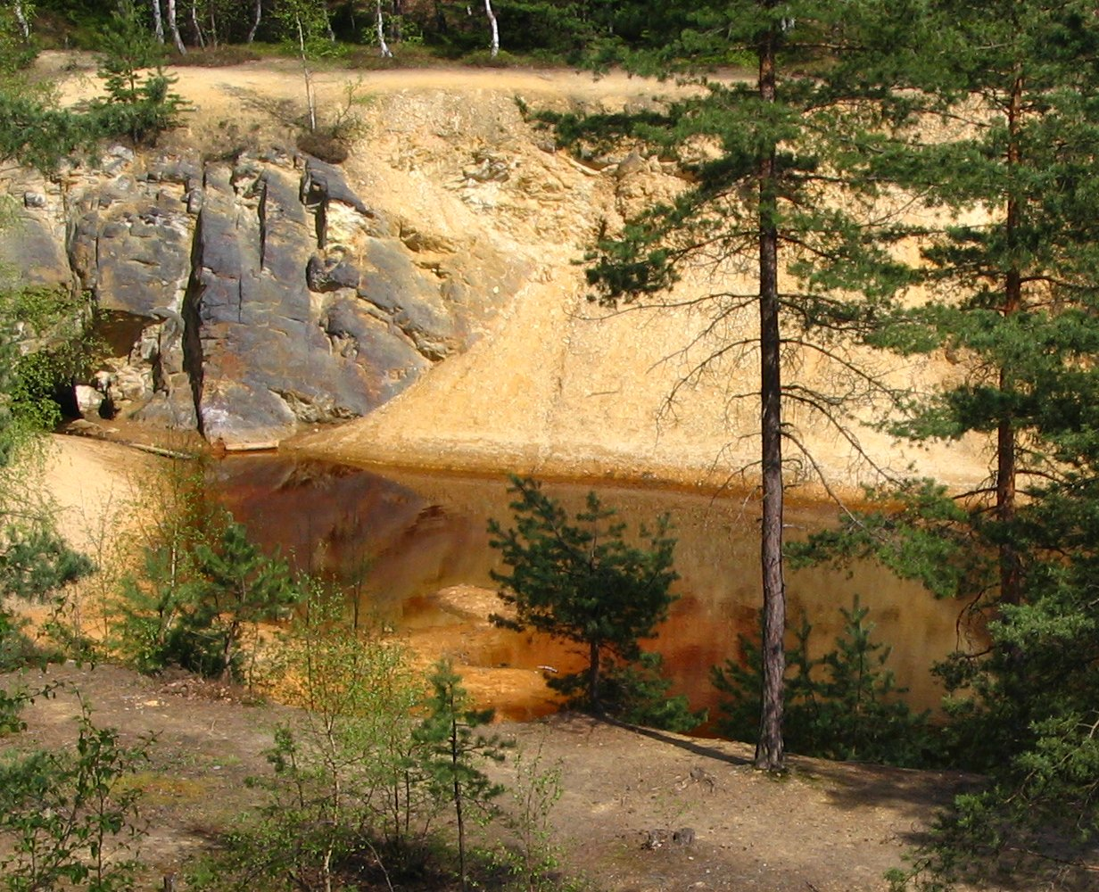 Jeziorko czerwone w Rudawach Janowickich autorem zdjęcia jest Pitert Author: Piter T.